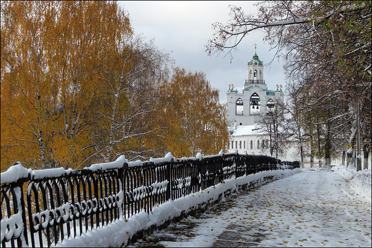 Ярославский историко-архитектурный музей-заповедник (центральные площади с прилегающими улицами и Волжская набережная) (Ярославская область, Ярославль, город Ярославль)